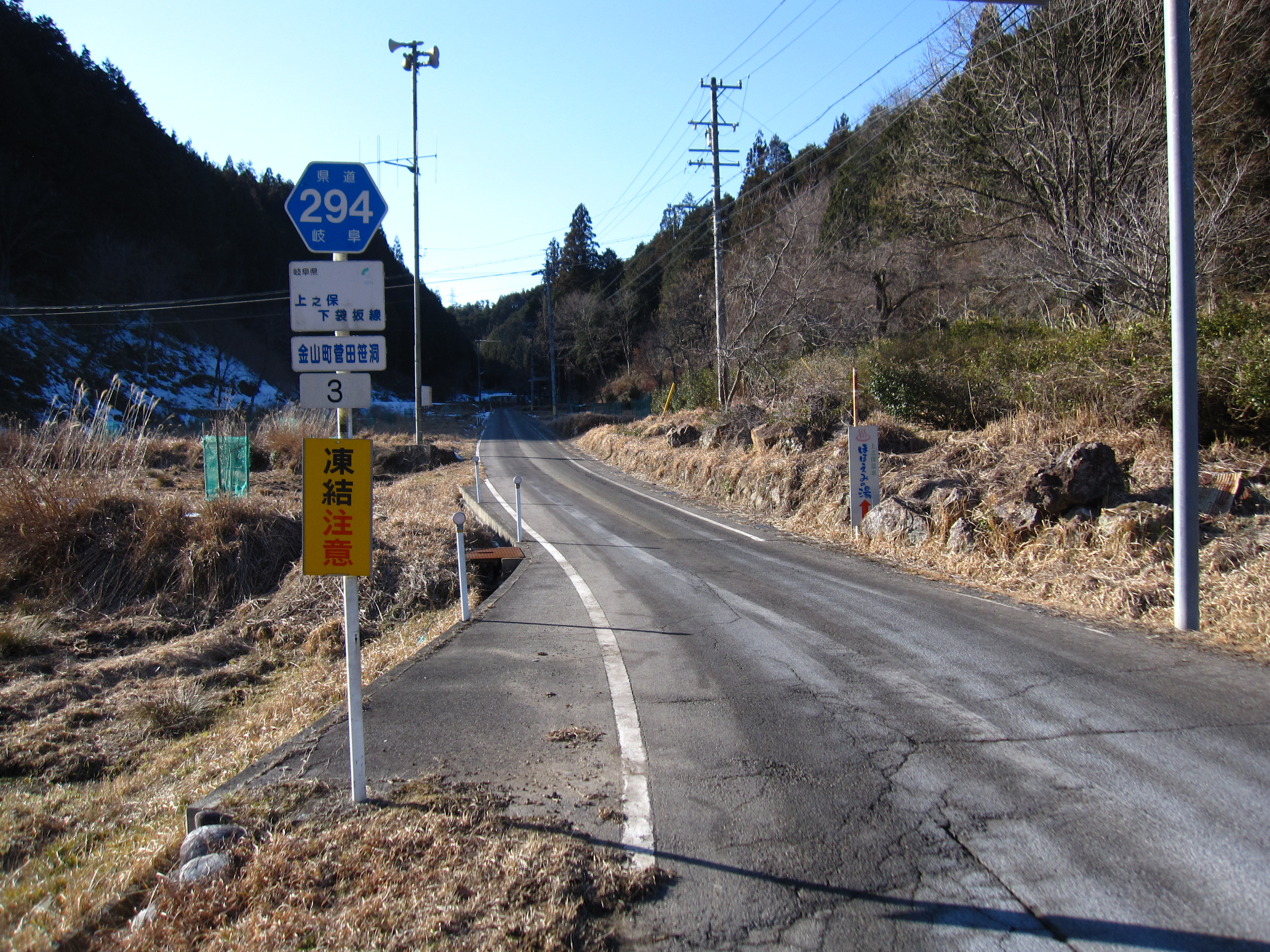 岐阜県道294号上之保下袋坂線で上之保方面を望む